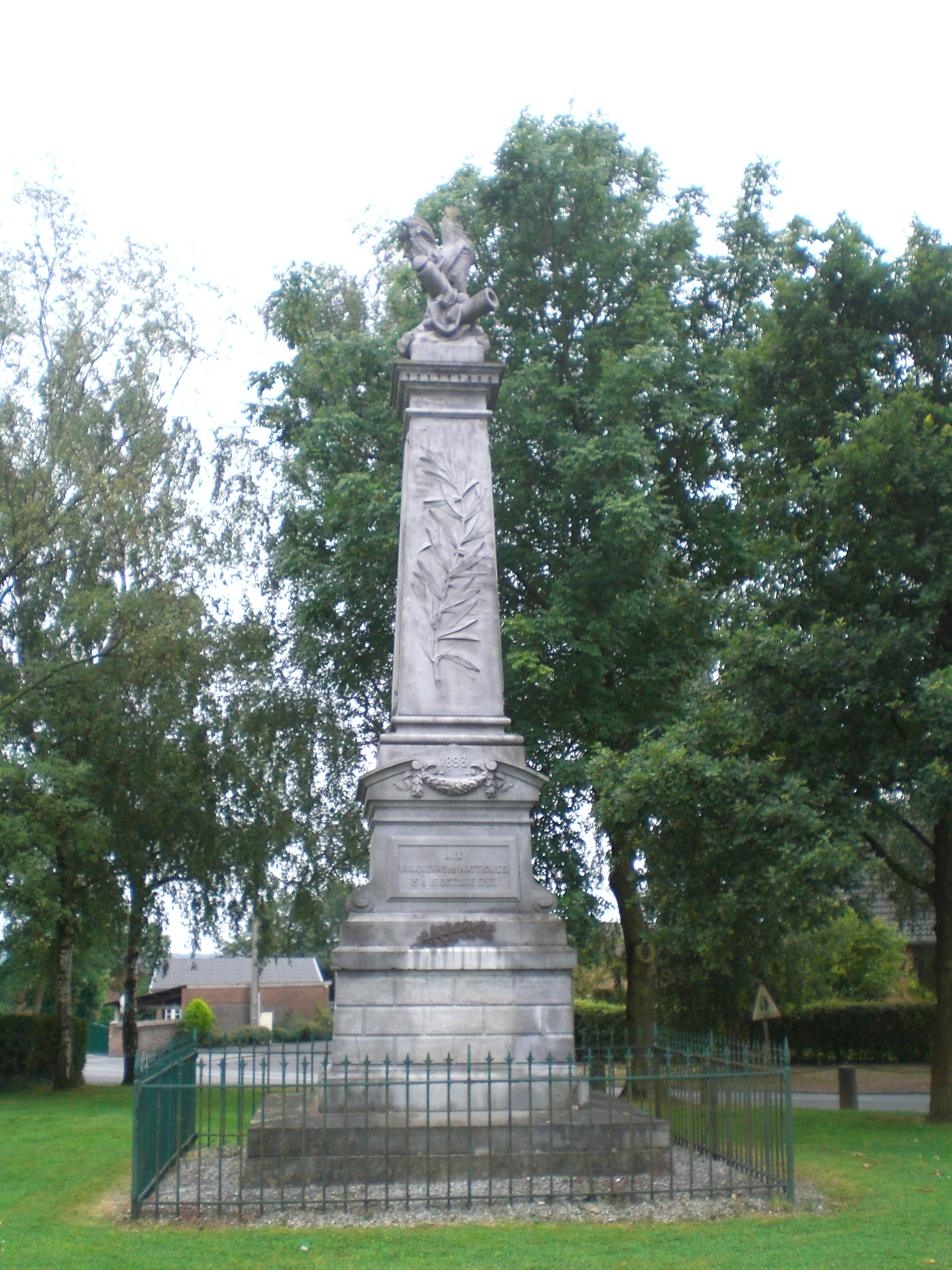 monument aux morts de Wattignies-la-Victoire commemorant la bataille de Wattigies en octobre 1793 contre l'autriche